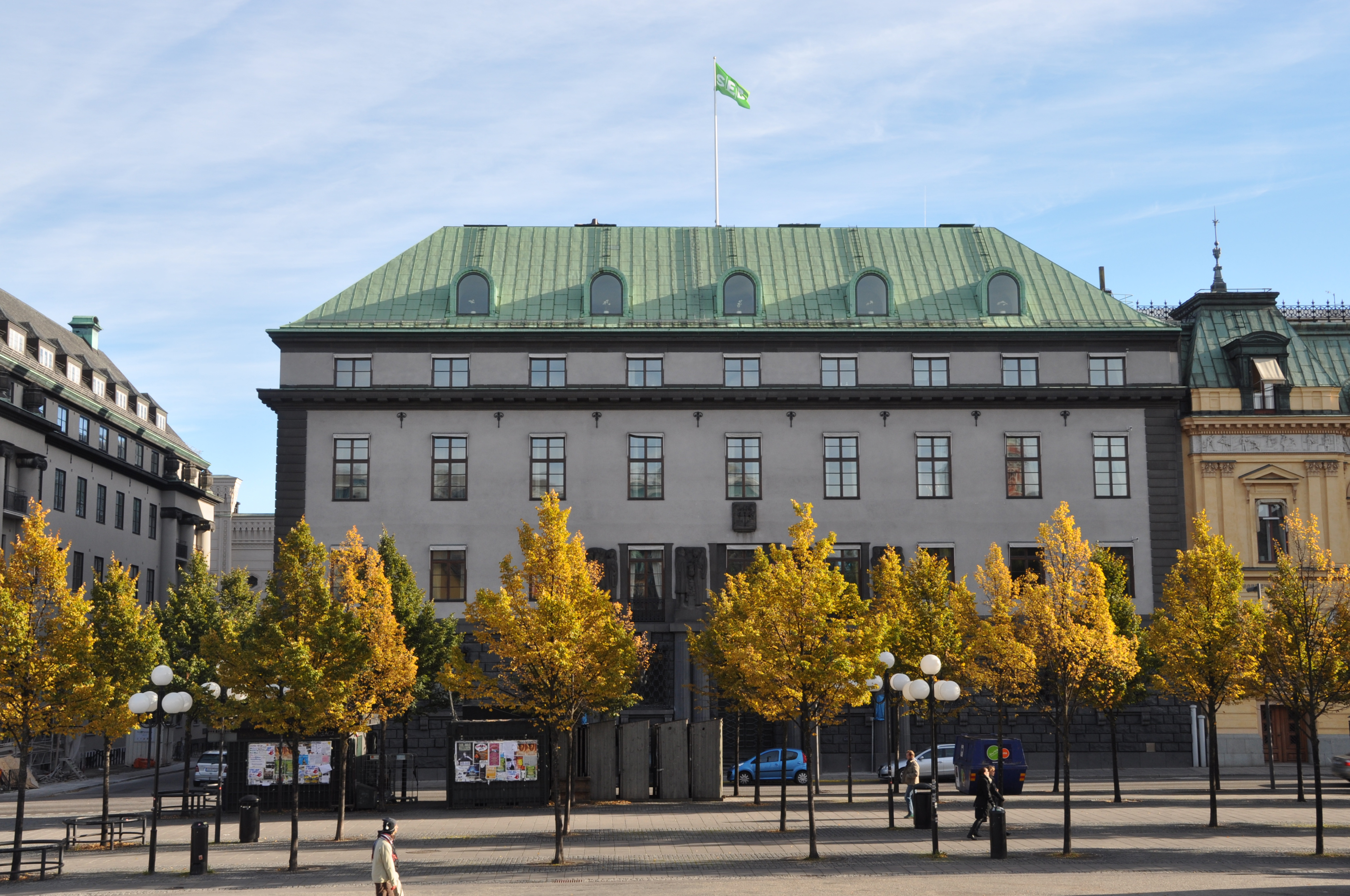 Kungsträdgårdsgatan 8